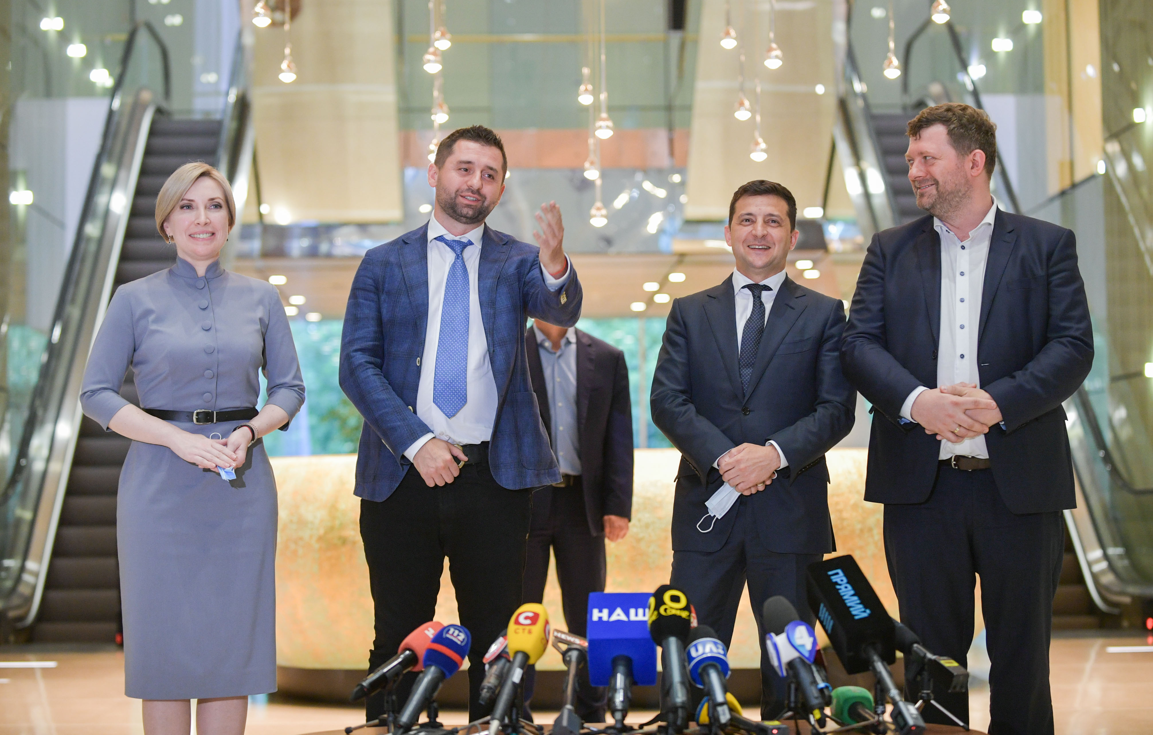 Володимир Зеленський підтримує висування народного депутата від партії «Слуга Народу» Ірини Верещук для участі у виборах міського голови Києва